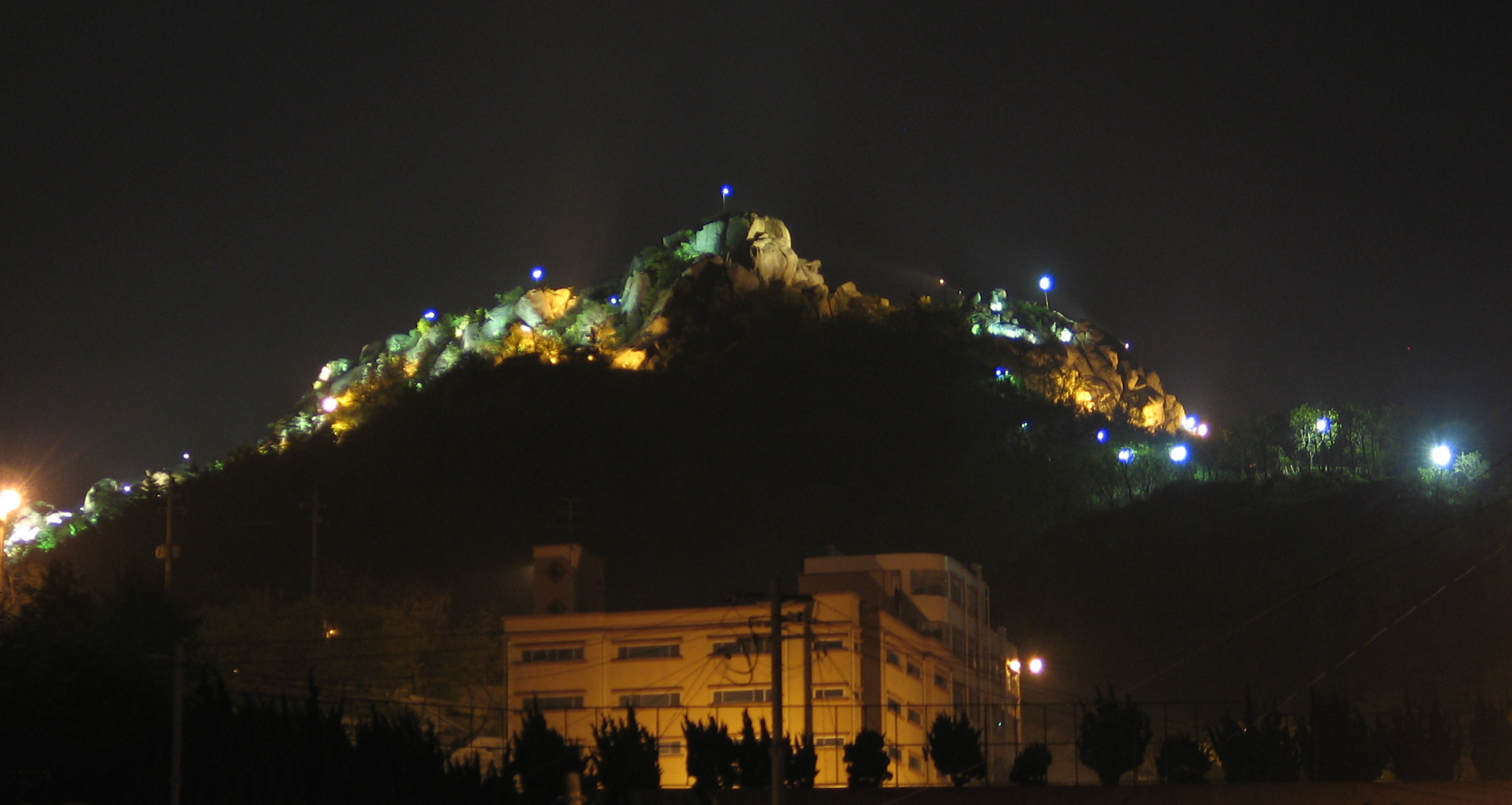 전라남도 목포 유달산의 야경